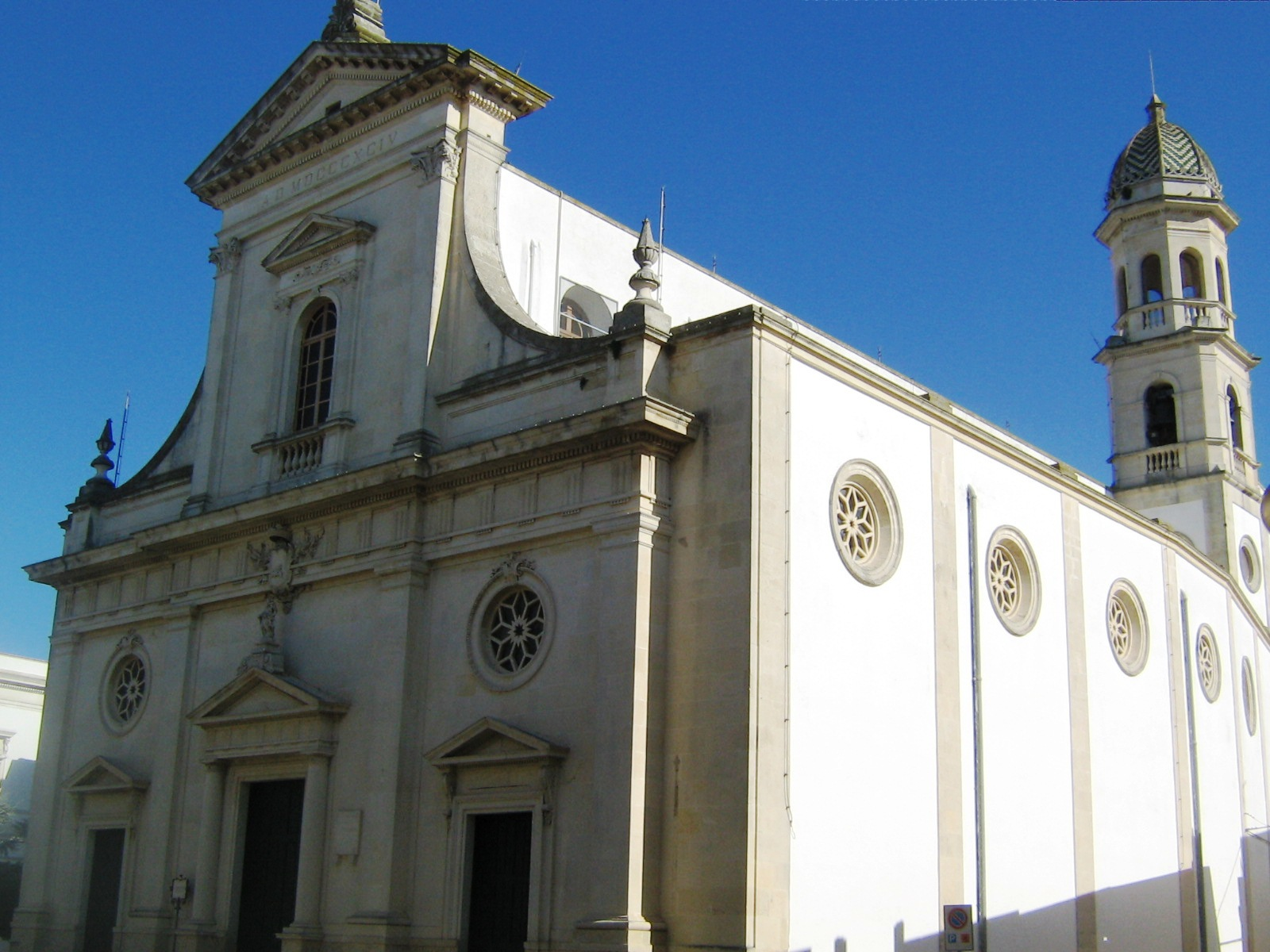 Chiesa Madre di Cutrofiano